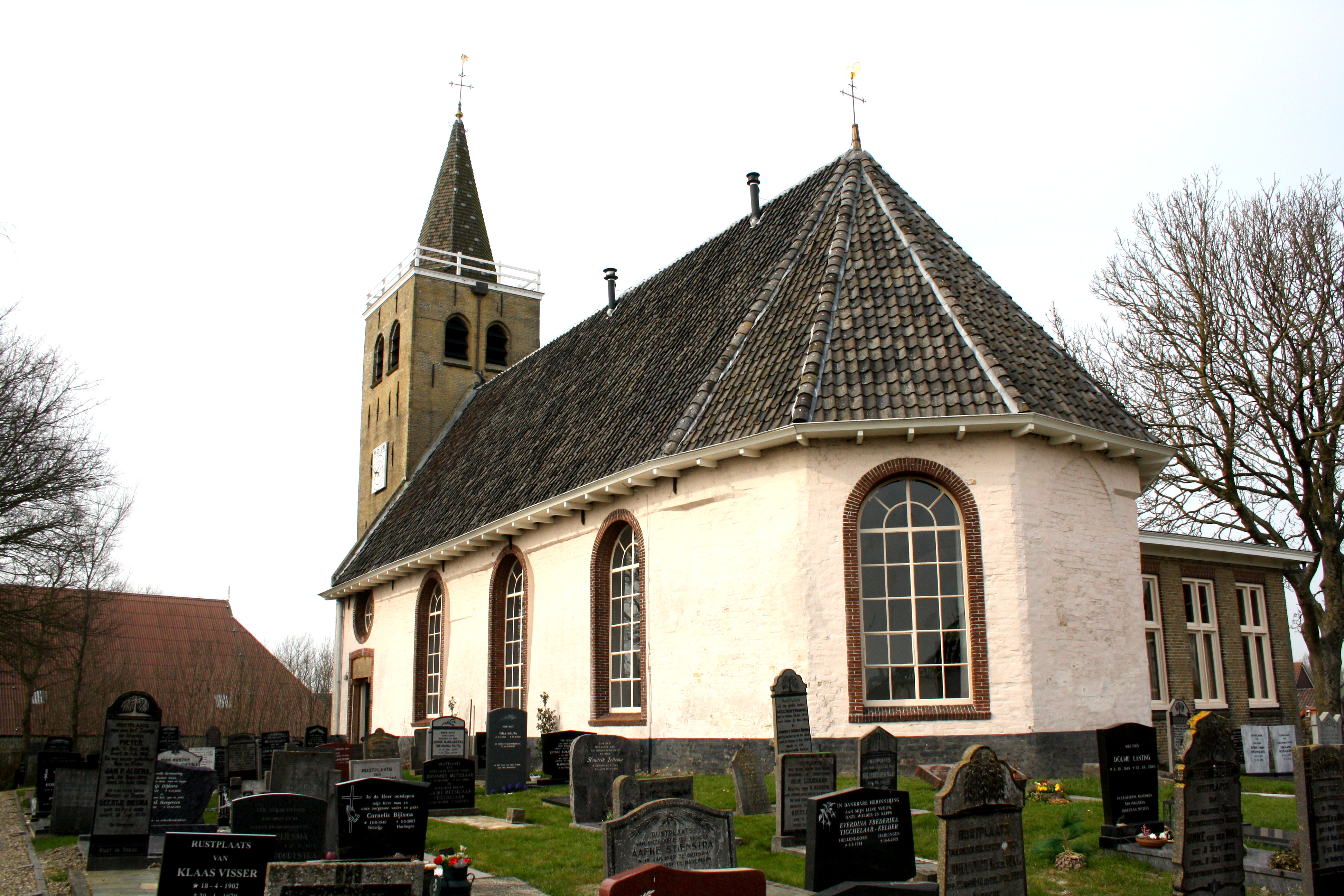 Friesland - Harlingen - Midlum - Nicolaaskerk